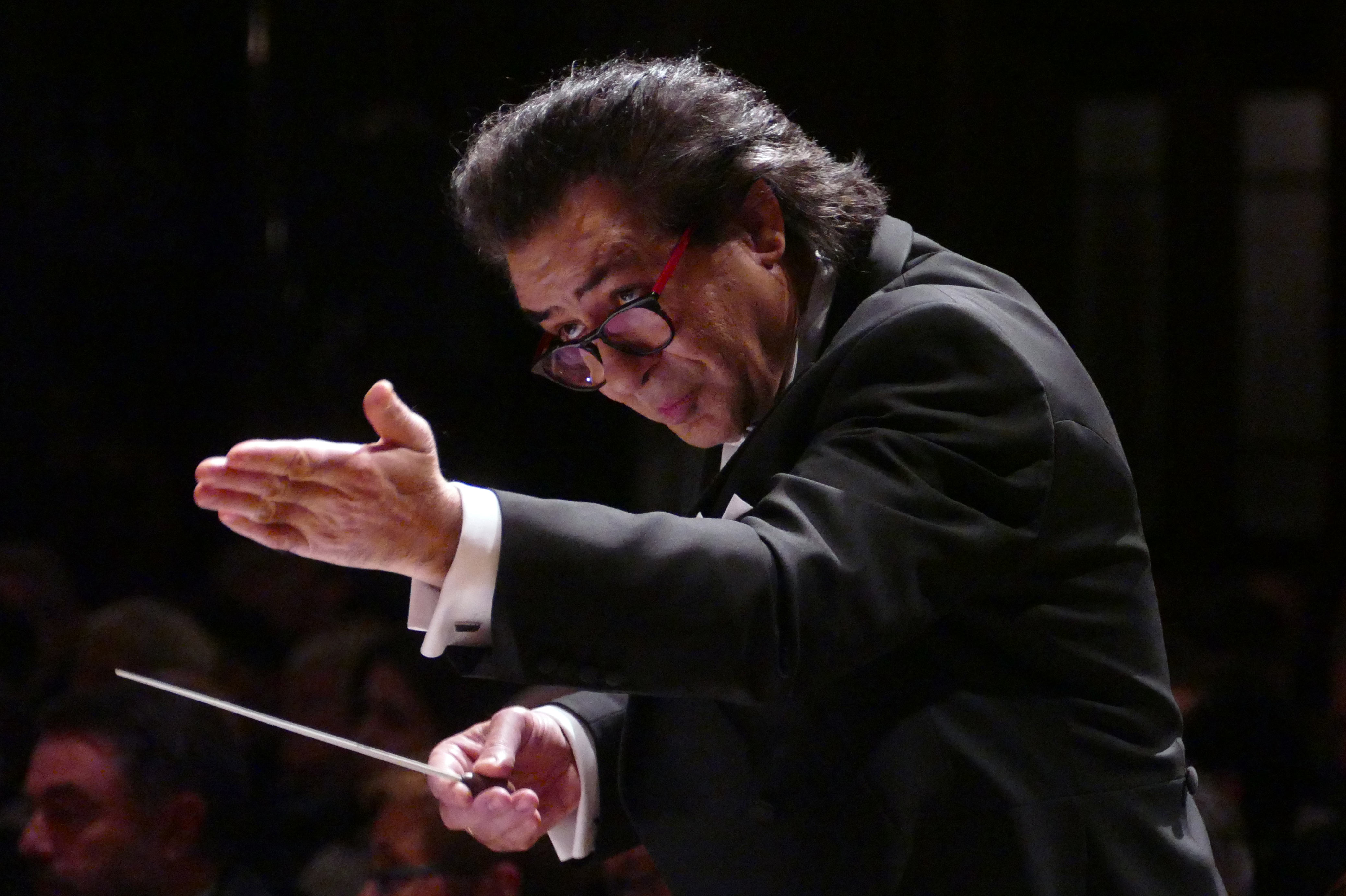 Riccardo M Sahiti, Dirigent und künstlerischer Leiter der Roma und Sinti Philharmoniker